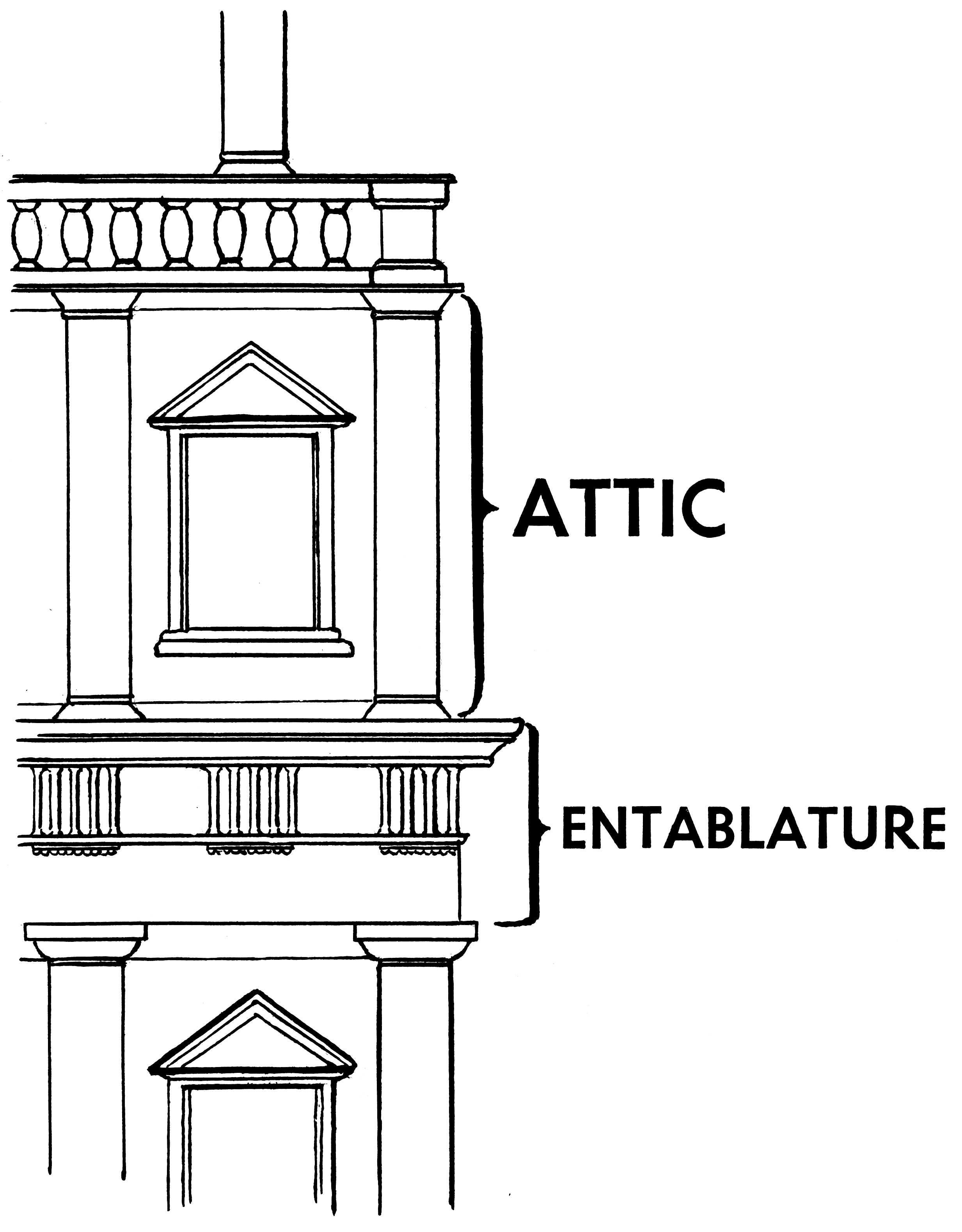 Attic